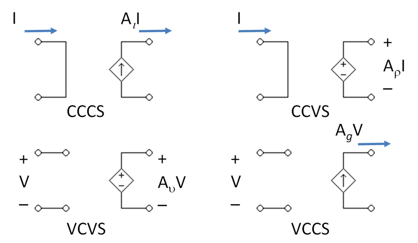 Dependent Sources